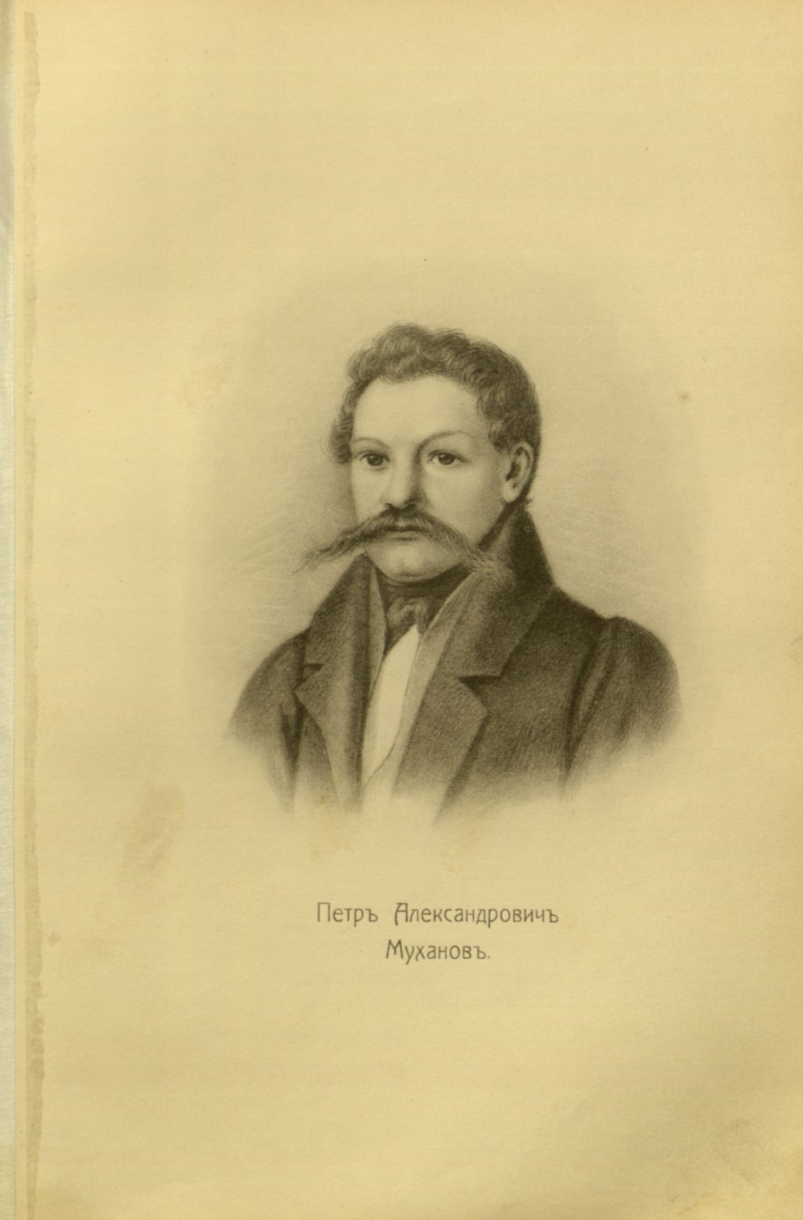 Муханов, Пётр Александрович